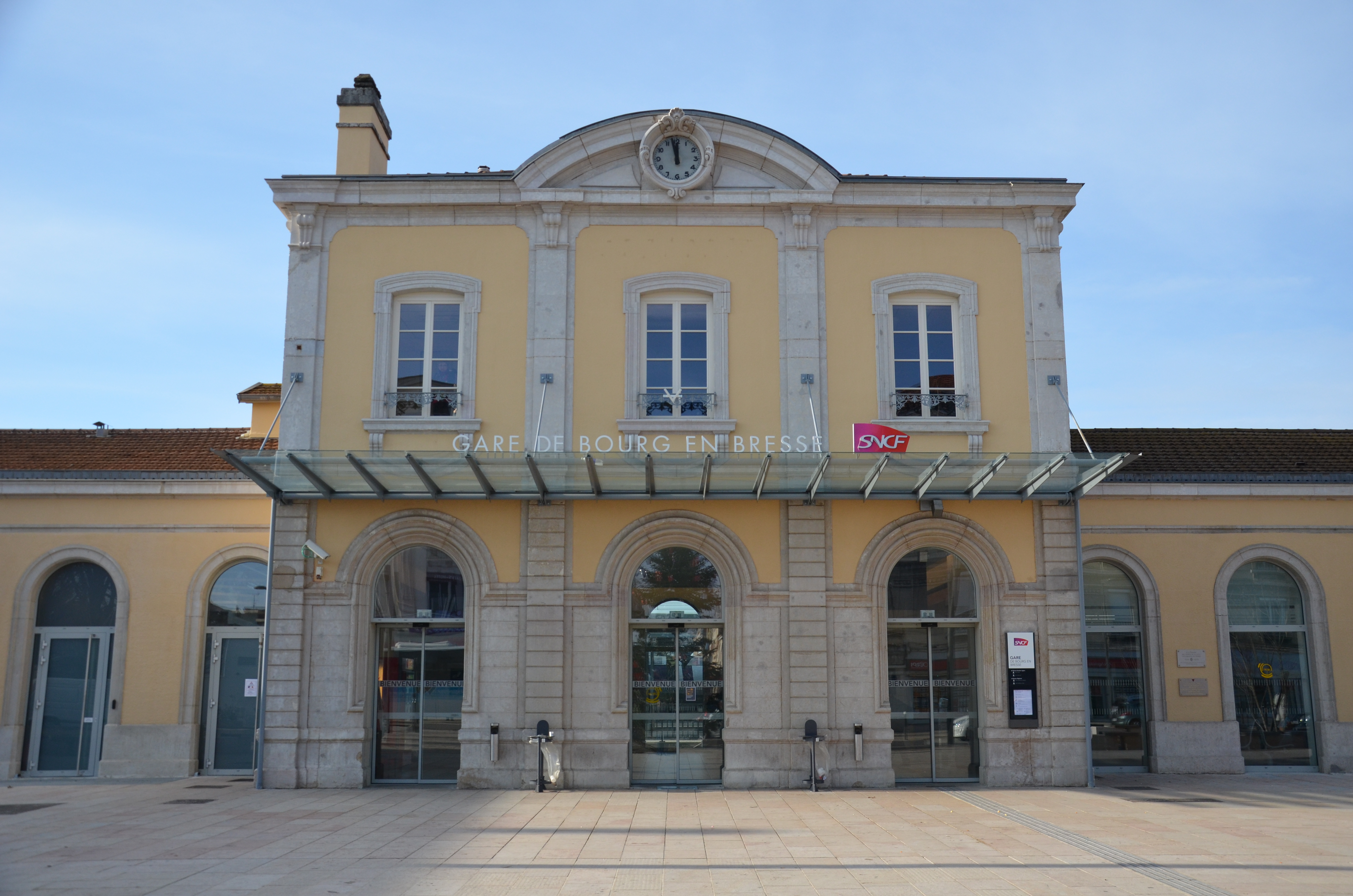 Bâtiment Voyageurs de la gare de Bourg-en-Bresse.